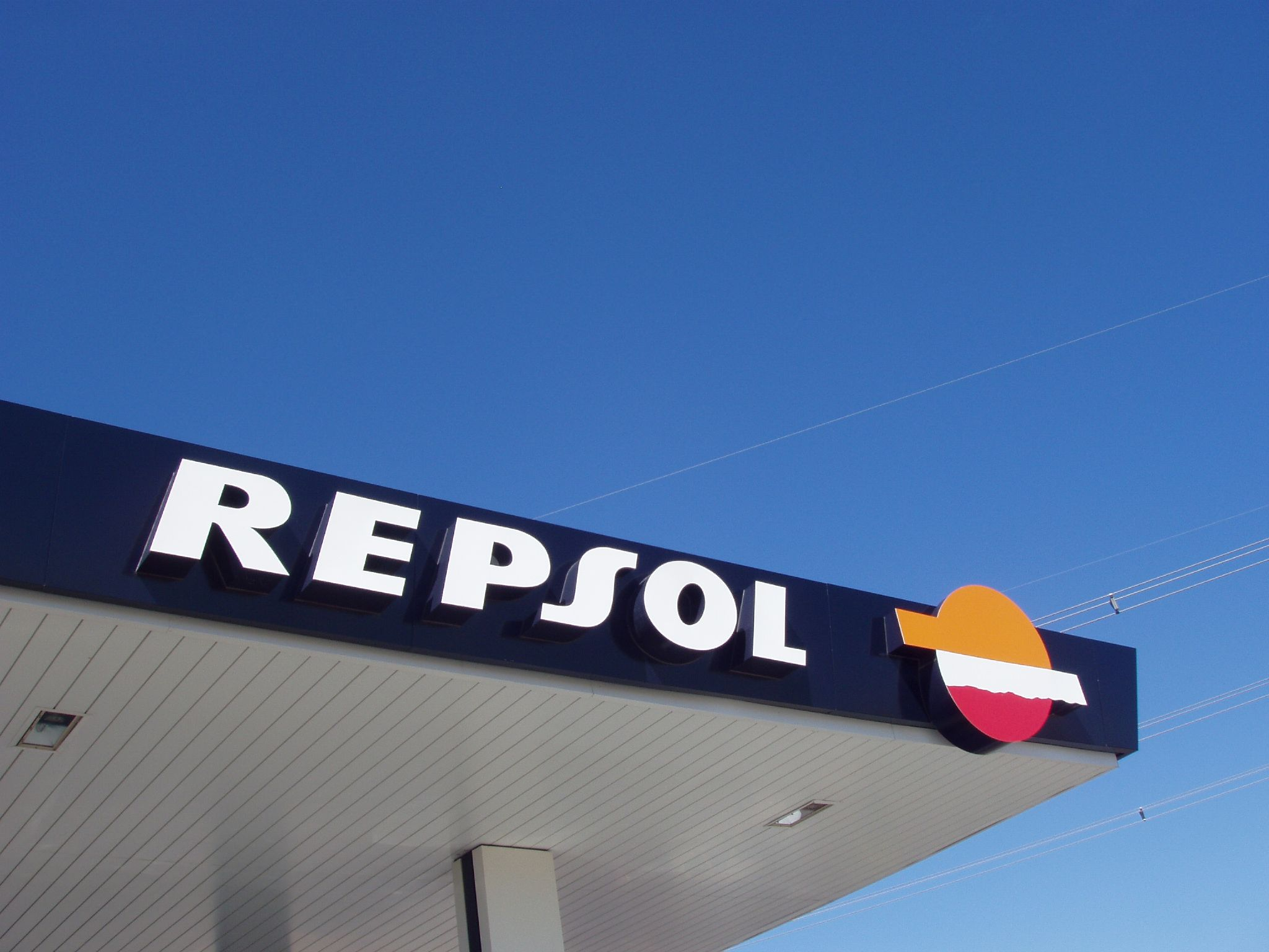 Estación de servicio de REPSOL